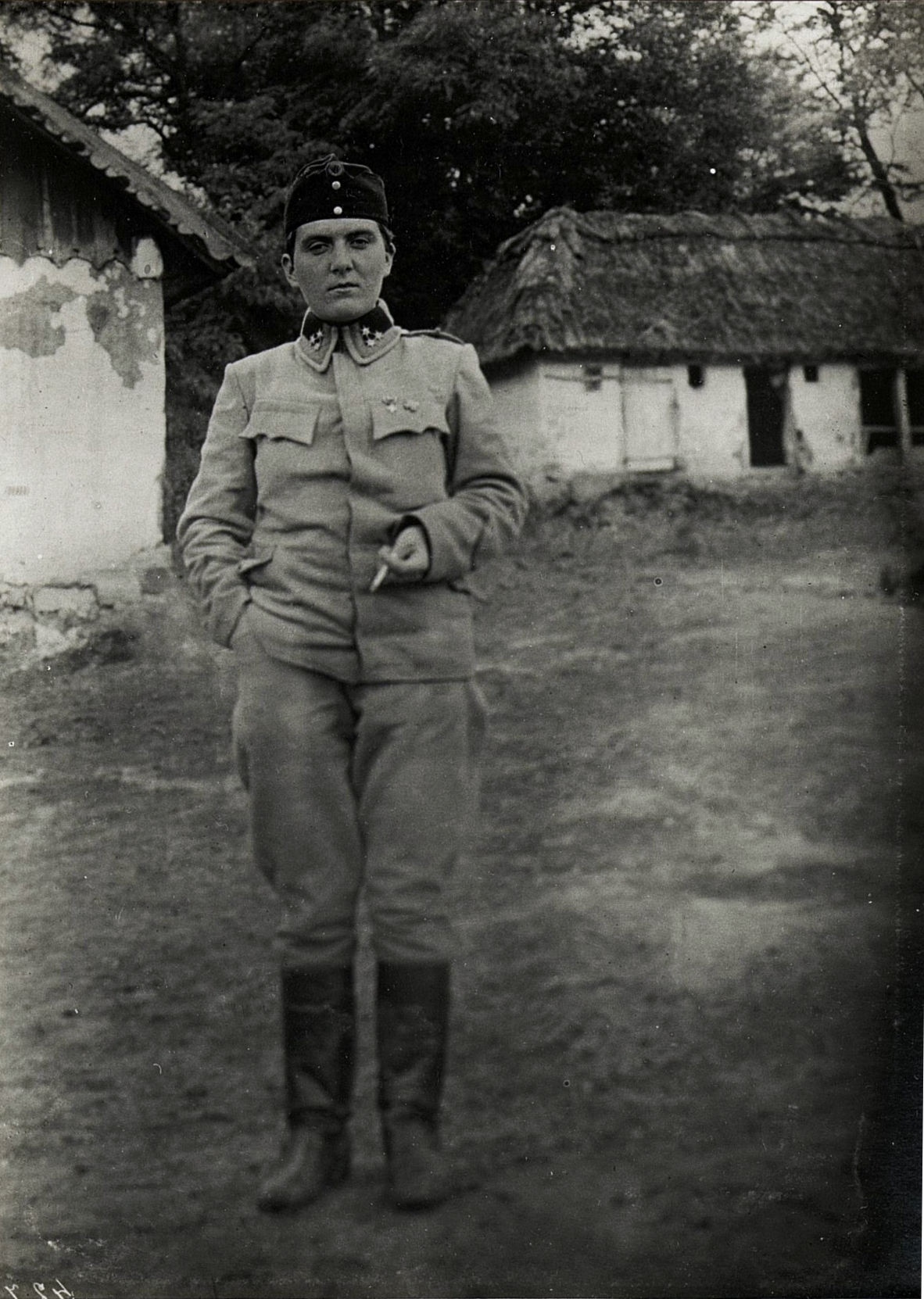 Кузь Олена (Ярина, Ірена, Єрина) Атанасіївна_3